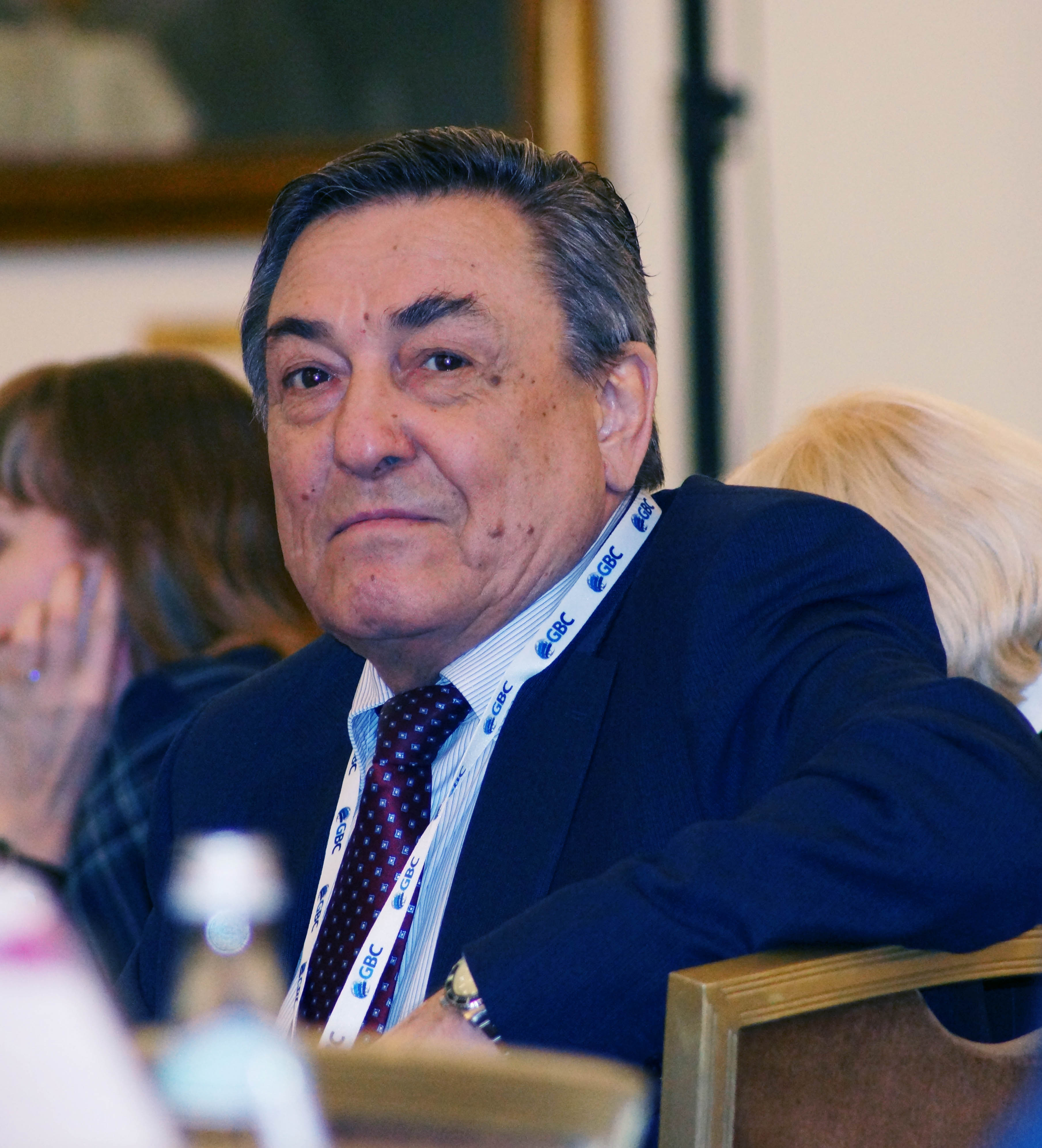 Аминев С.Х.